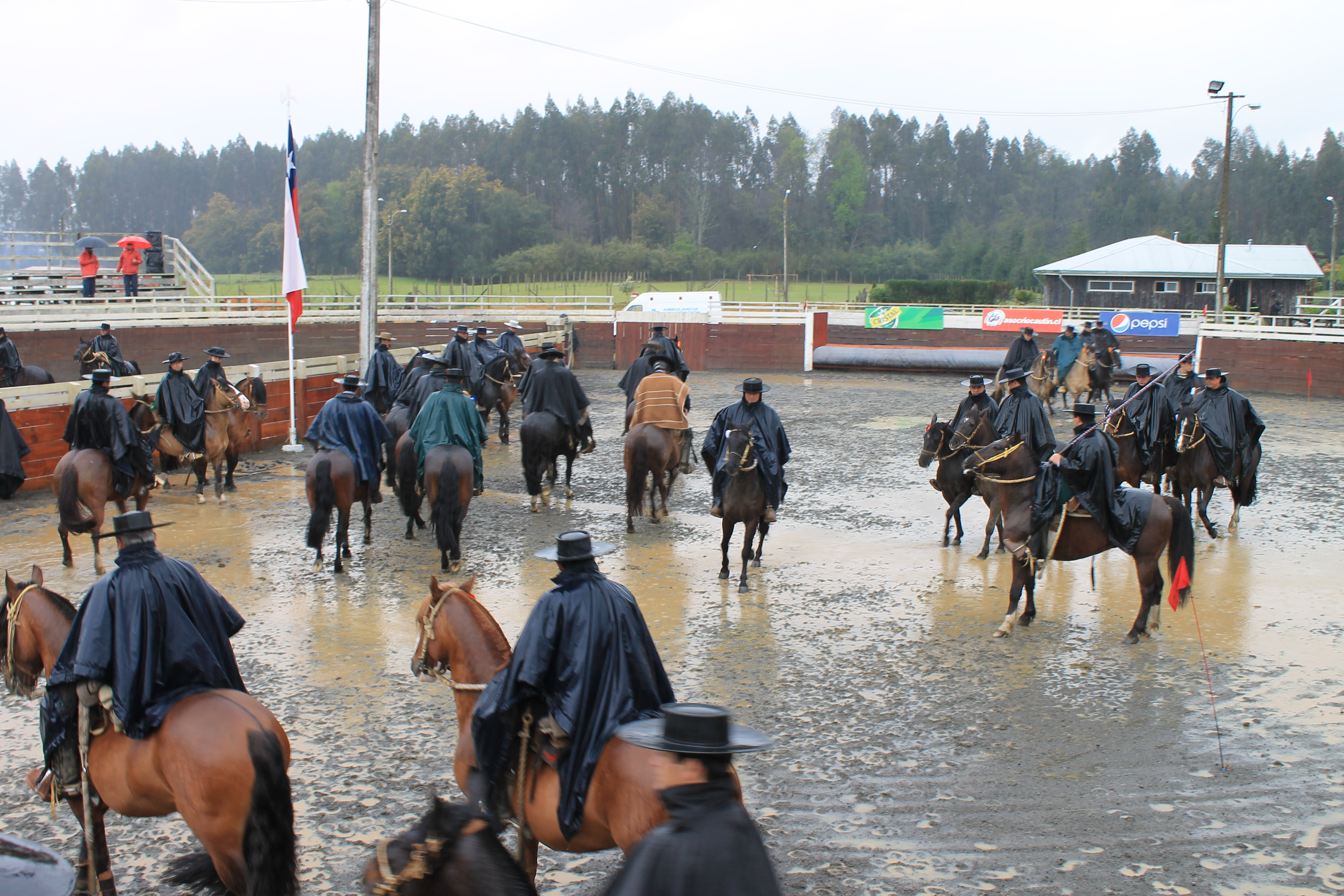 Rodeo en Medialuna de Loncoche